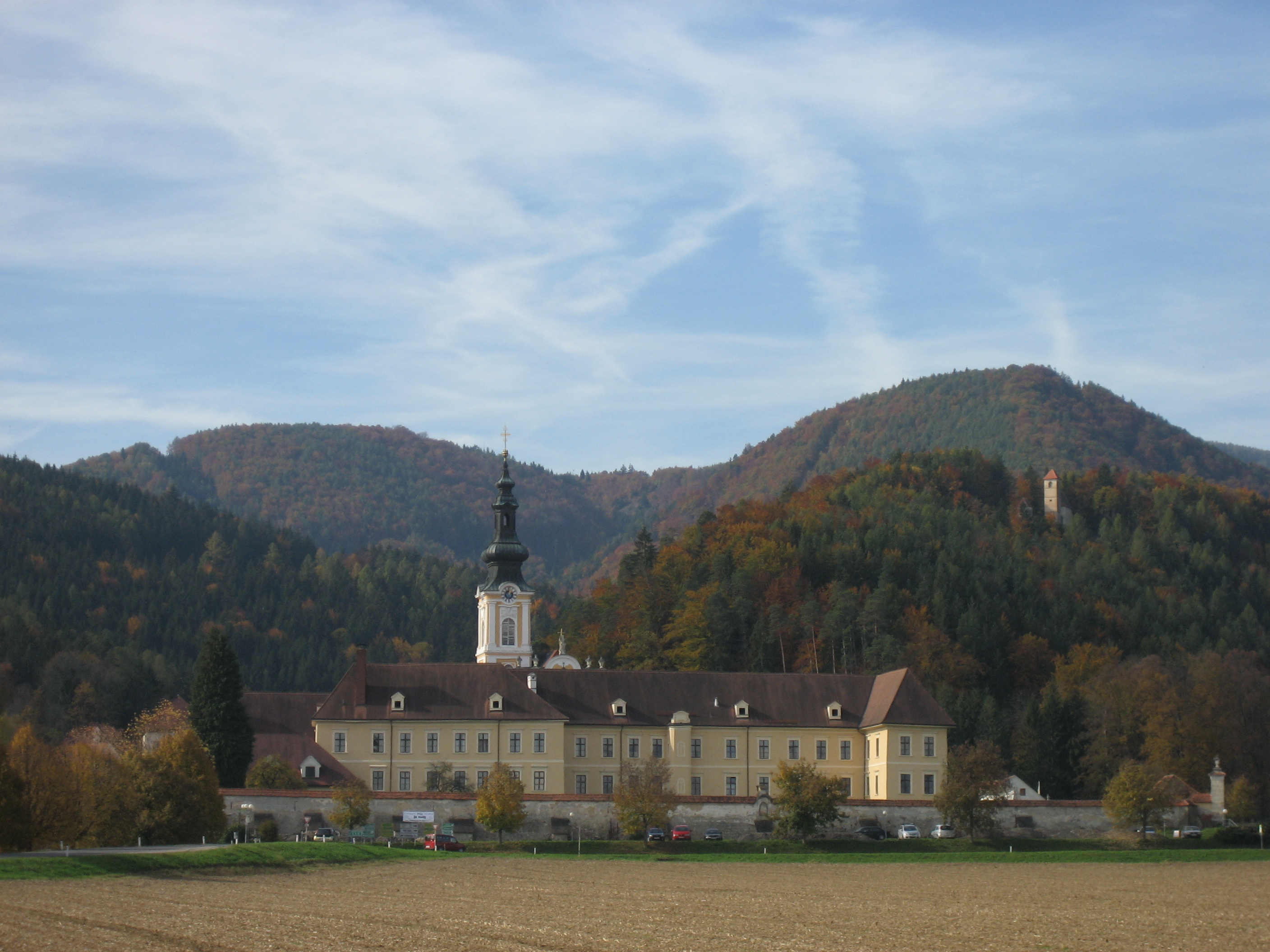 Stift Rein (in der Nähe von Graz, Österreich)